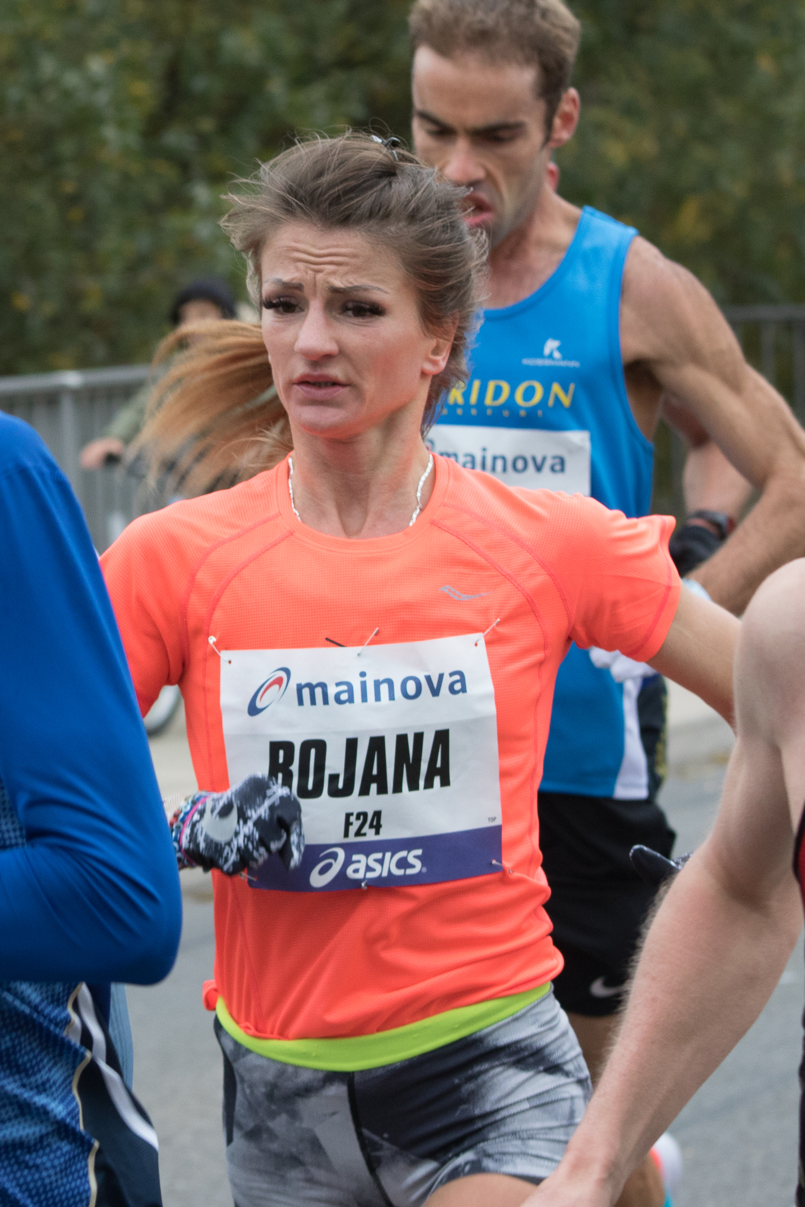 Frankfurt Marathon 2018, October 28. Bojana Bjeljac